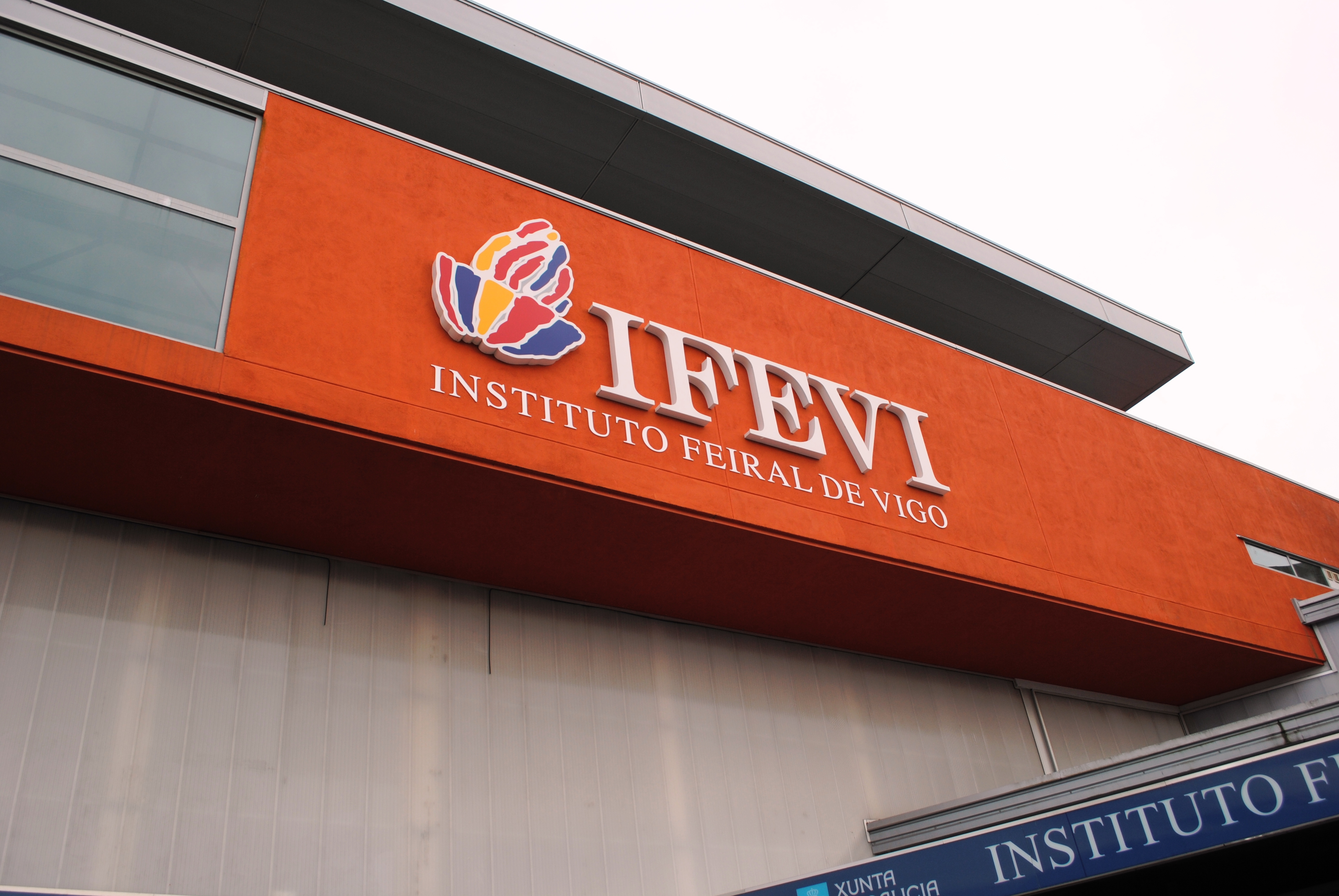 IFEVI, Instituto Feiral de Vigo.JPG